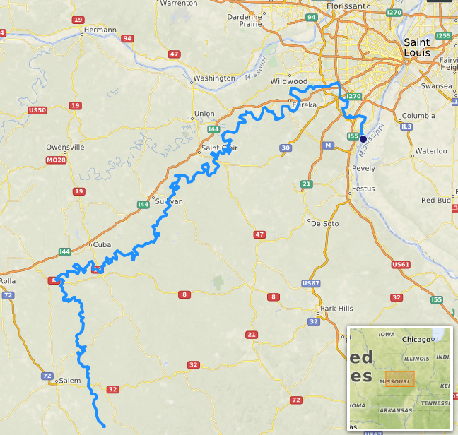 carte réalisée sur umap, [1] This map may be incomplete, and may contain errors. Don't rely solely on it for navigation.